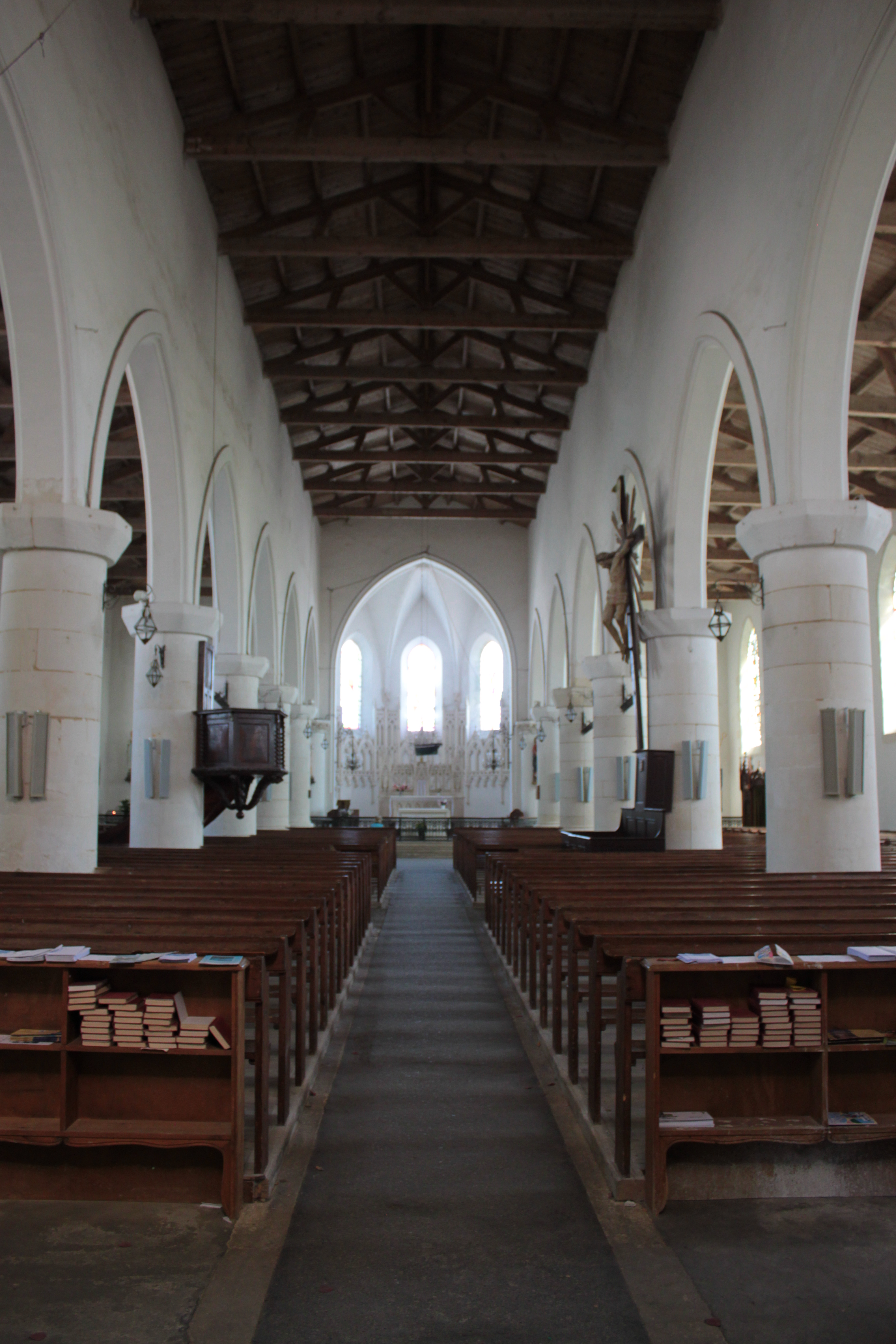 Nef, église Notre-Dame de l'Assomption, Fr-17-Sainte-Marie-de-Ré.